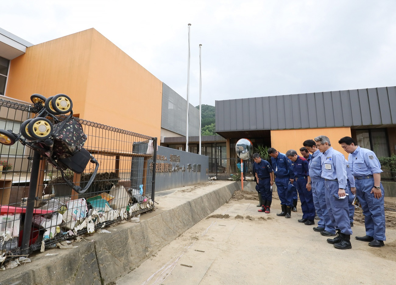 令和２年７月豪雨による被害状況視察のための熊本県訪問